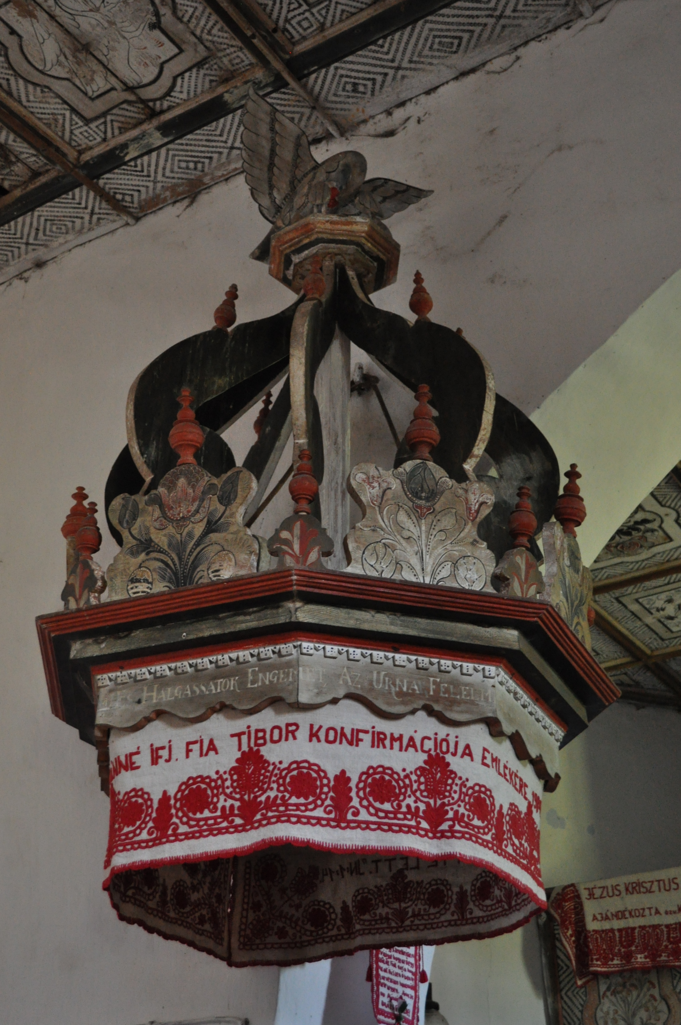 Biserica reformată, sat SFĂRAŞ; comuna ALMAŞU 01